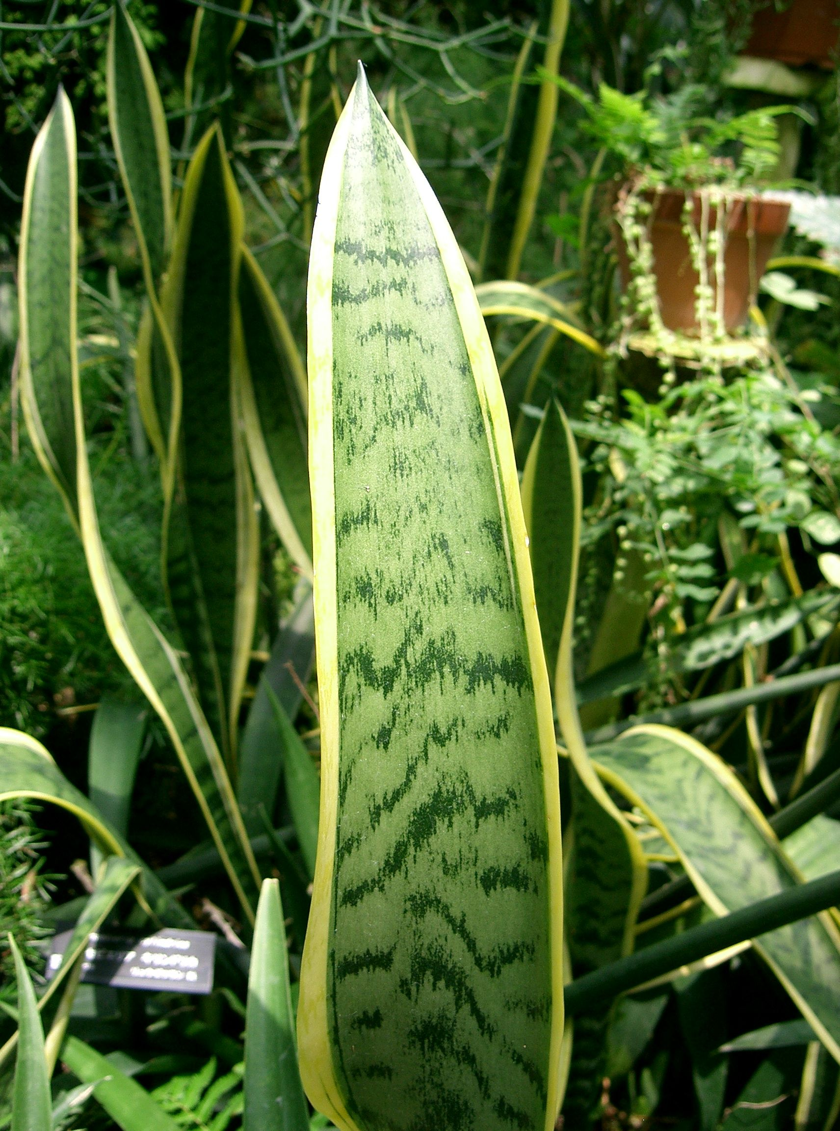 Sansevieria trifasciata